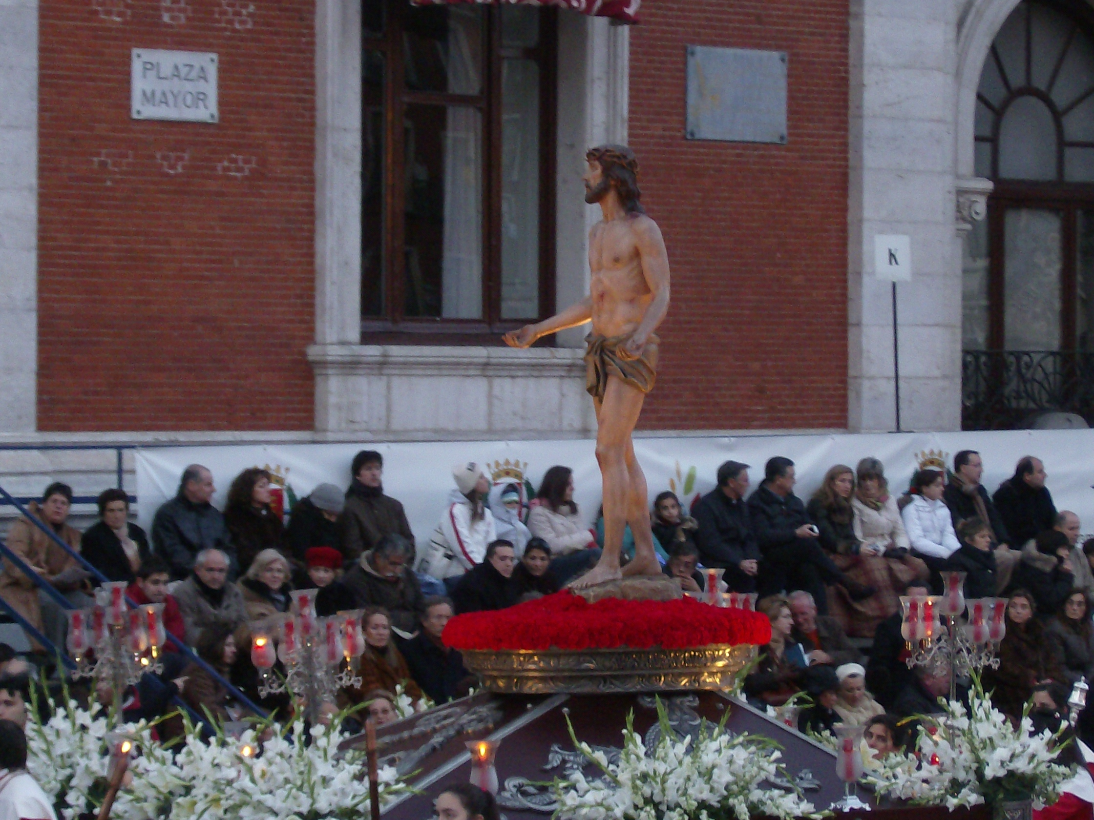 Cristo Despojado (Hernandez Navarro)